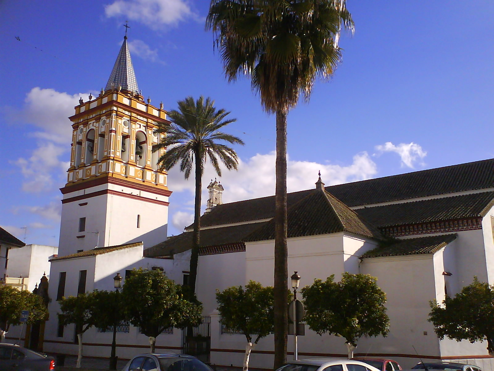 Iglesia Santa María en Sanlúcar la Mayor (Sevilla). Estilo mudejar